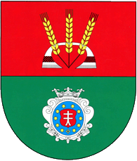 Герб Апостолівського району Дніпропетровської області